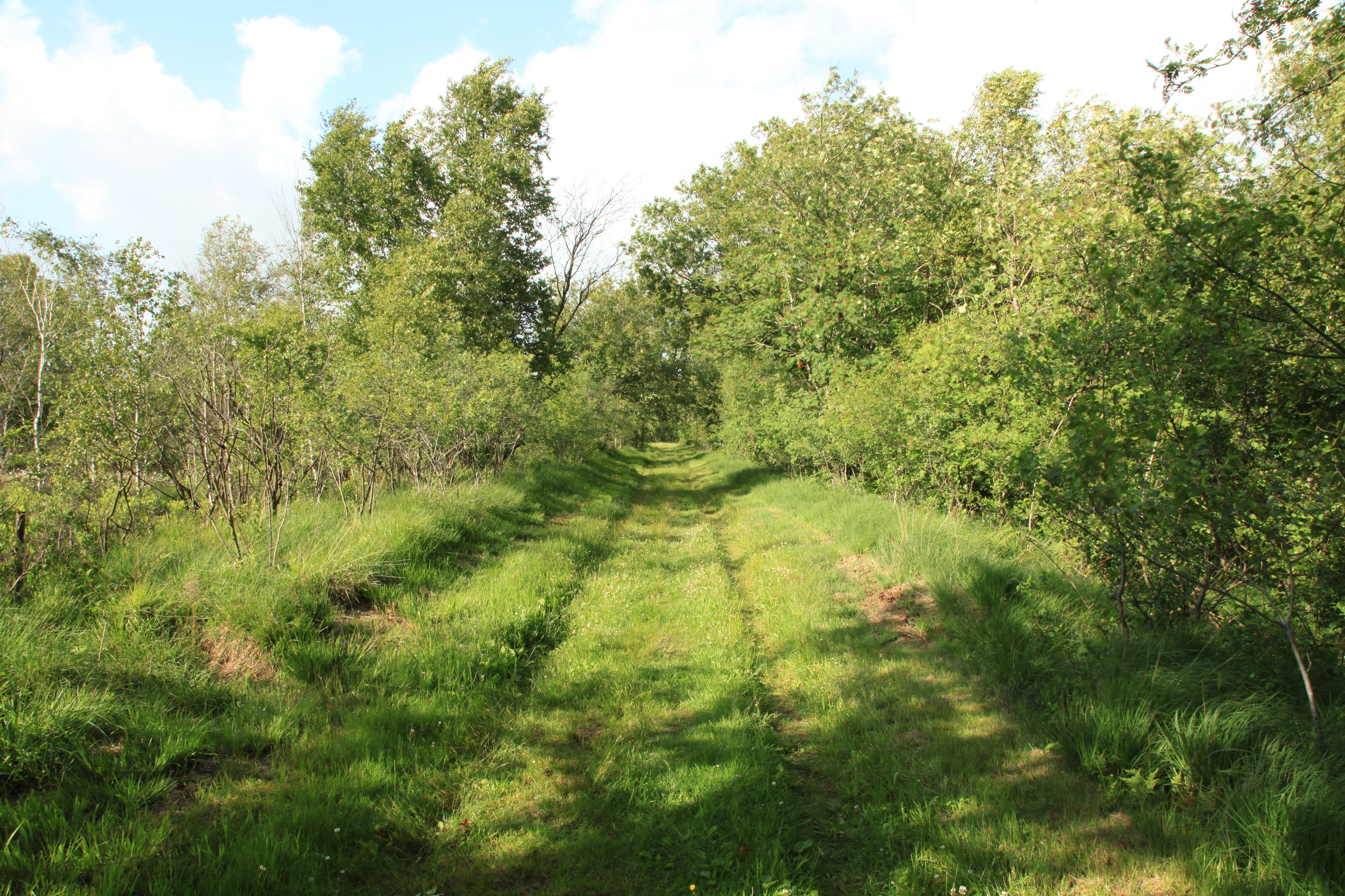 Hartshoper Moor in Sophienhamm